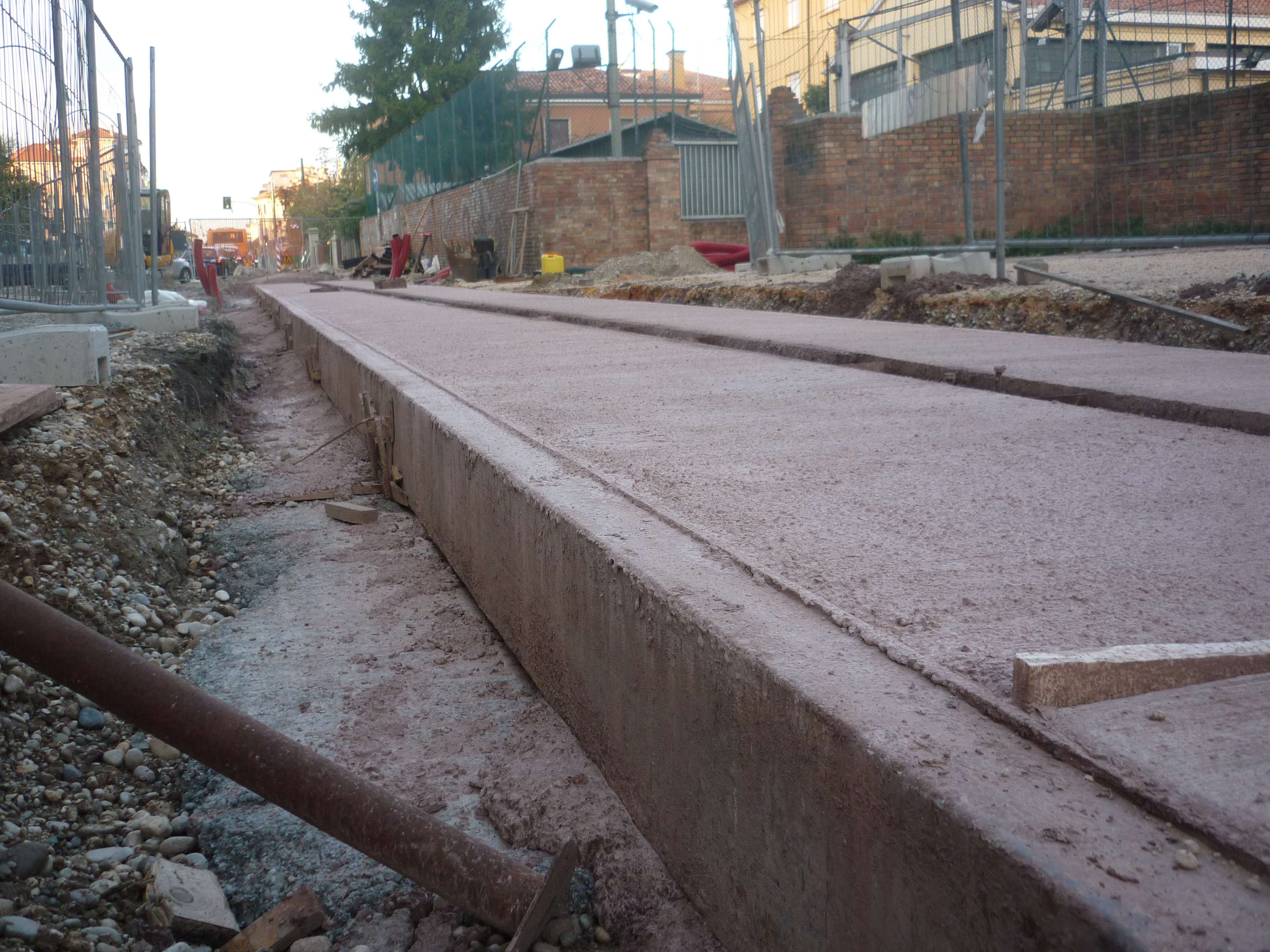 tram mestre-venezia